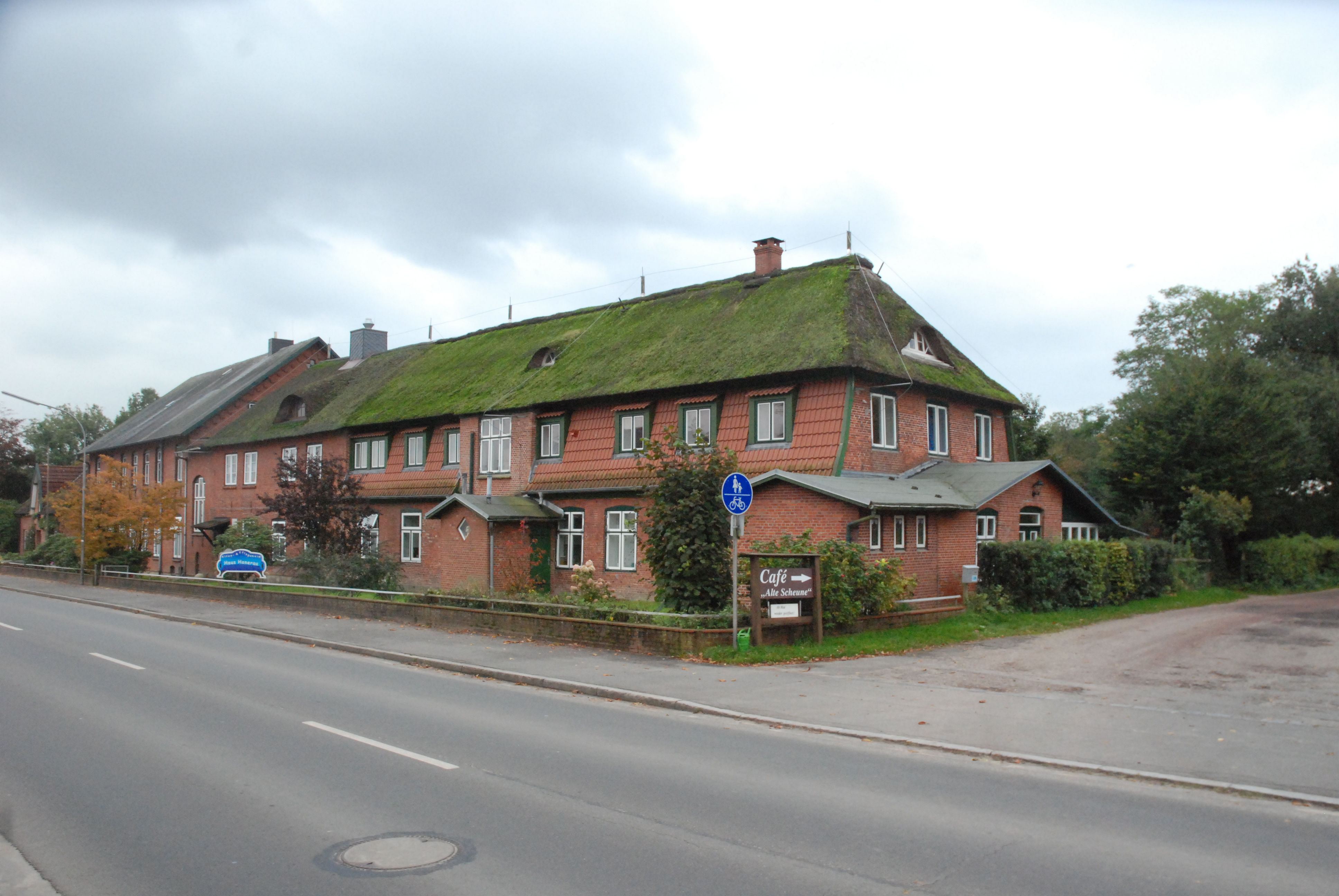 Mannhardtstraße 67, Wohnhaus, ehem. Leinenfabrik